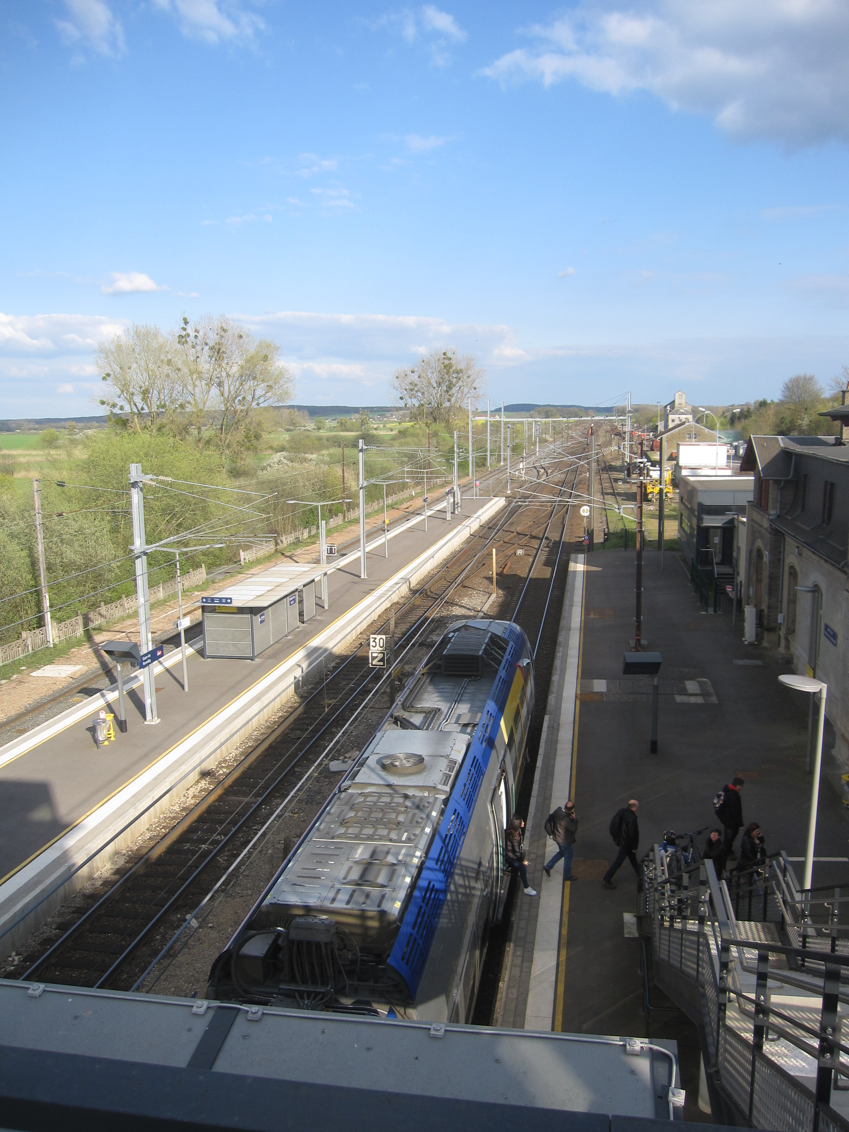 Arrêt à 17h37 du train 834363 Metz - Sarrebourg